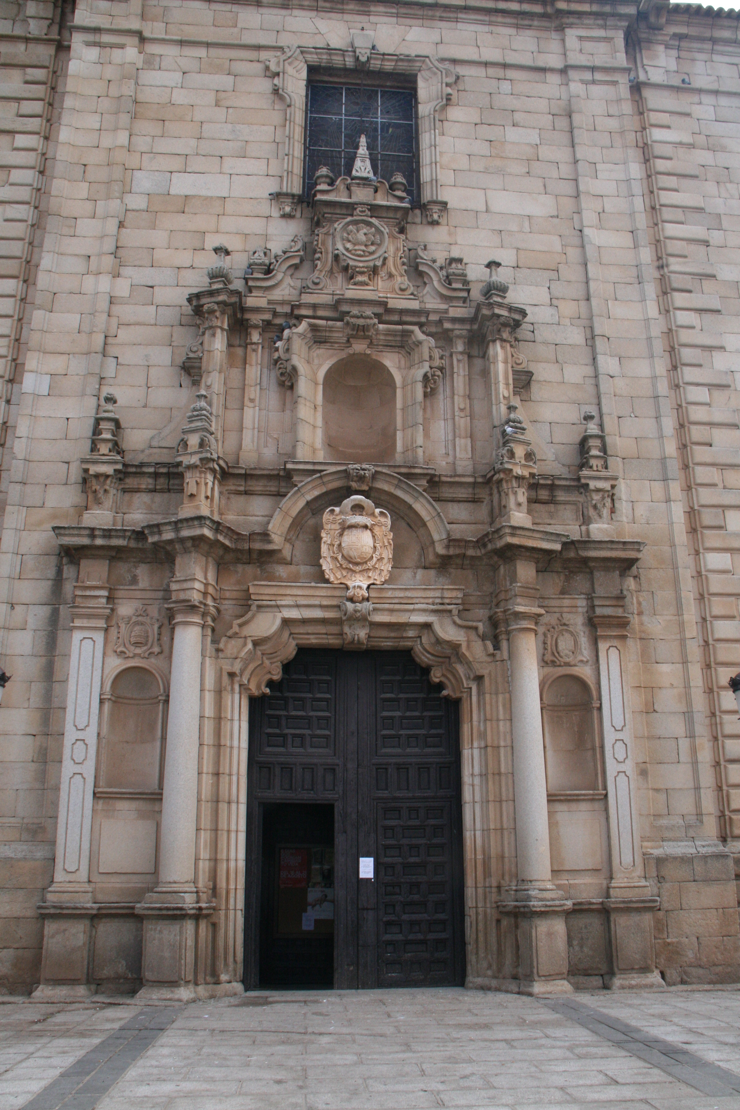 Portada Iglesia de Santo Tomás Apóstol (Orgaz) Toledo